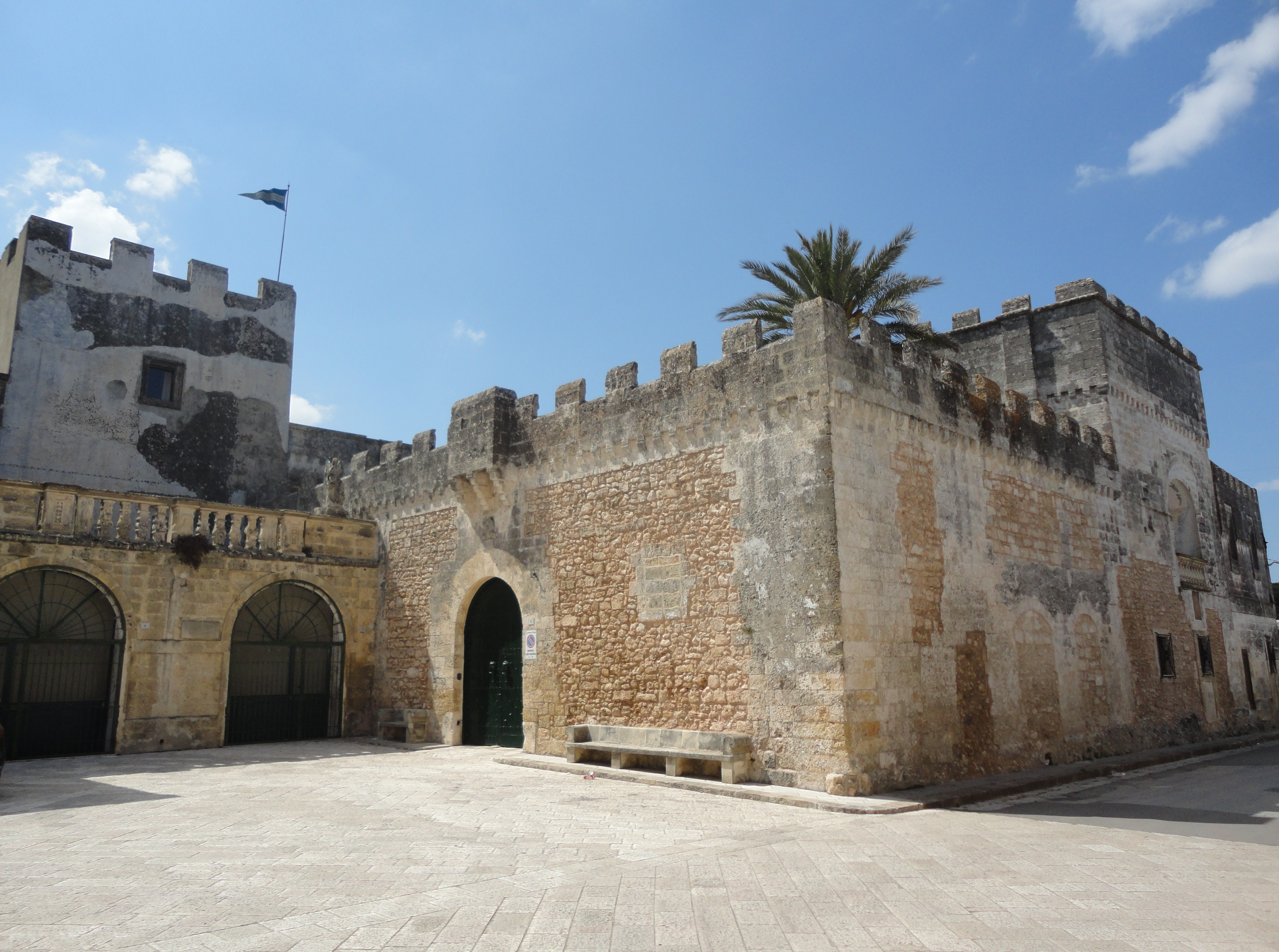 Castello di Depressa Tricase, Lecce